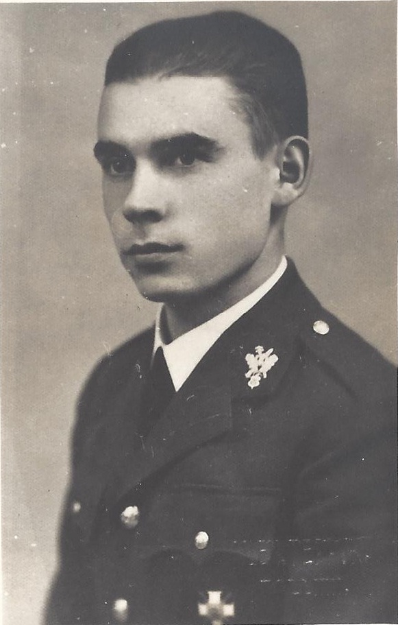 Kõrgema Sõjakooli aspirant